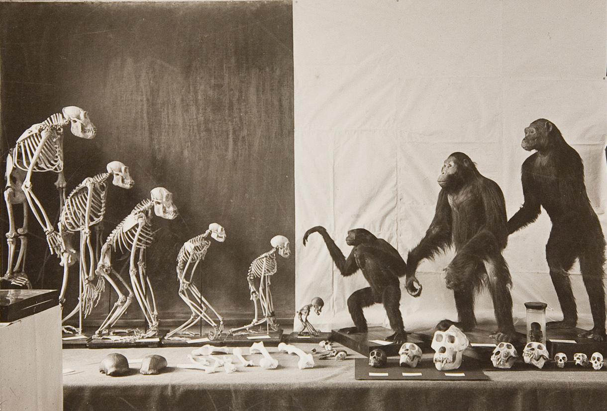 История Дарвиновского музея/ Экспозиция_музея_в_Мерзляковском_переулке